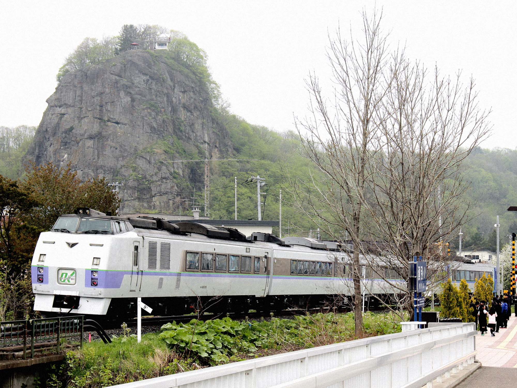 瞰望岩（がんぼういわ）、北海道紋別郡遠軽町